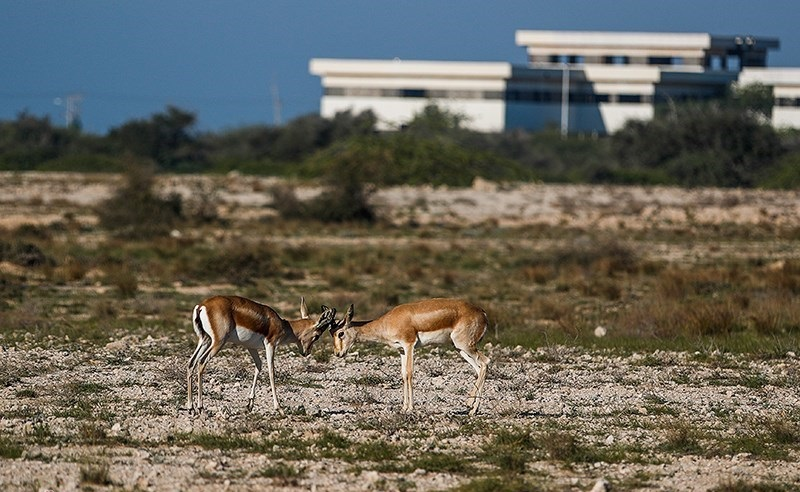 آهوی ایرانی